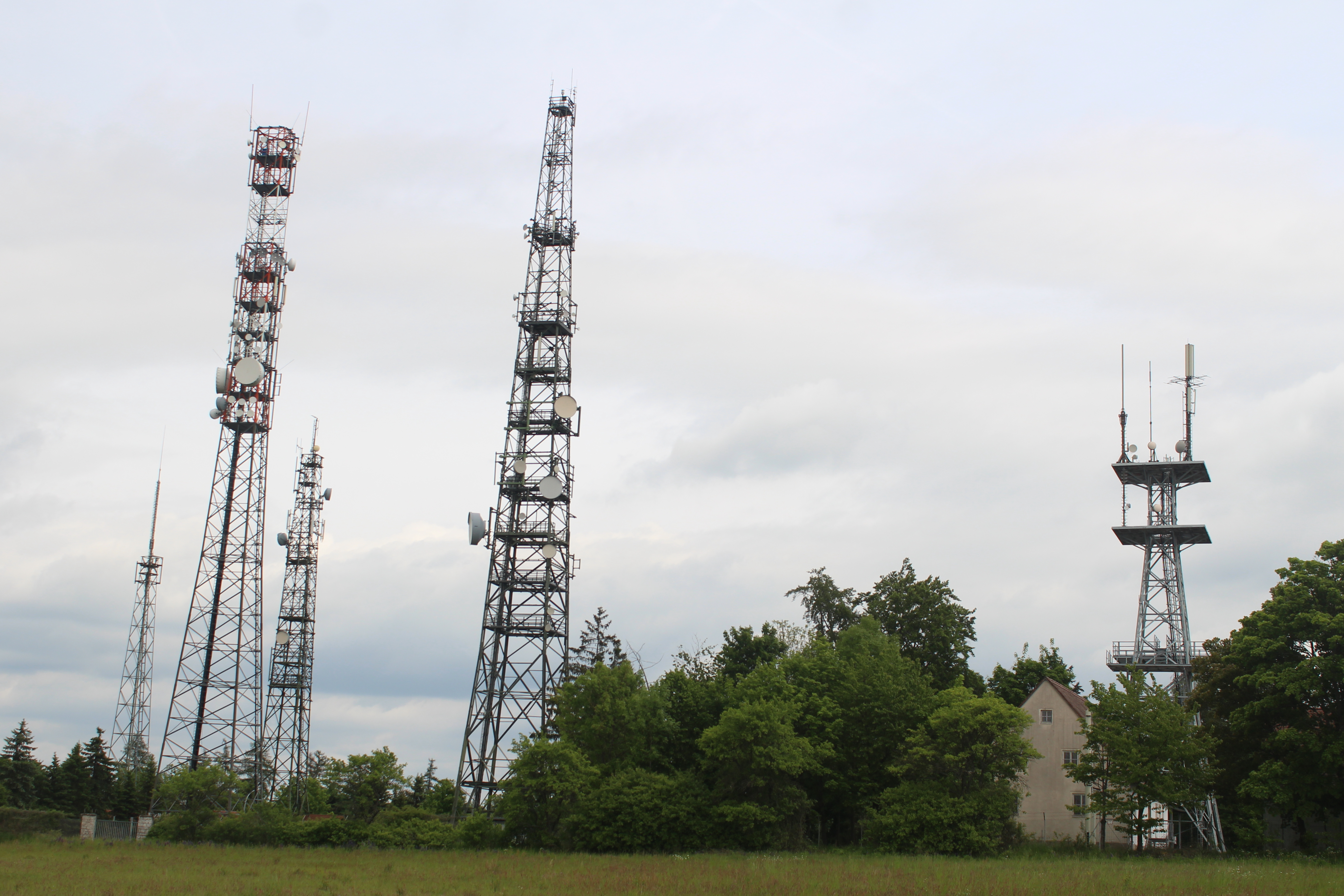 Sendeturm und Richtfunkanlage Schwanberg